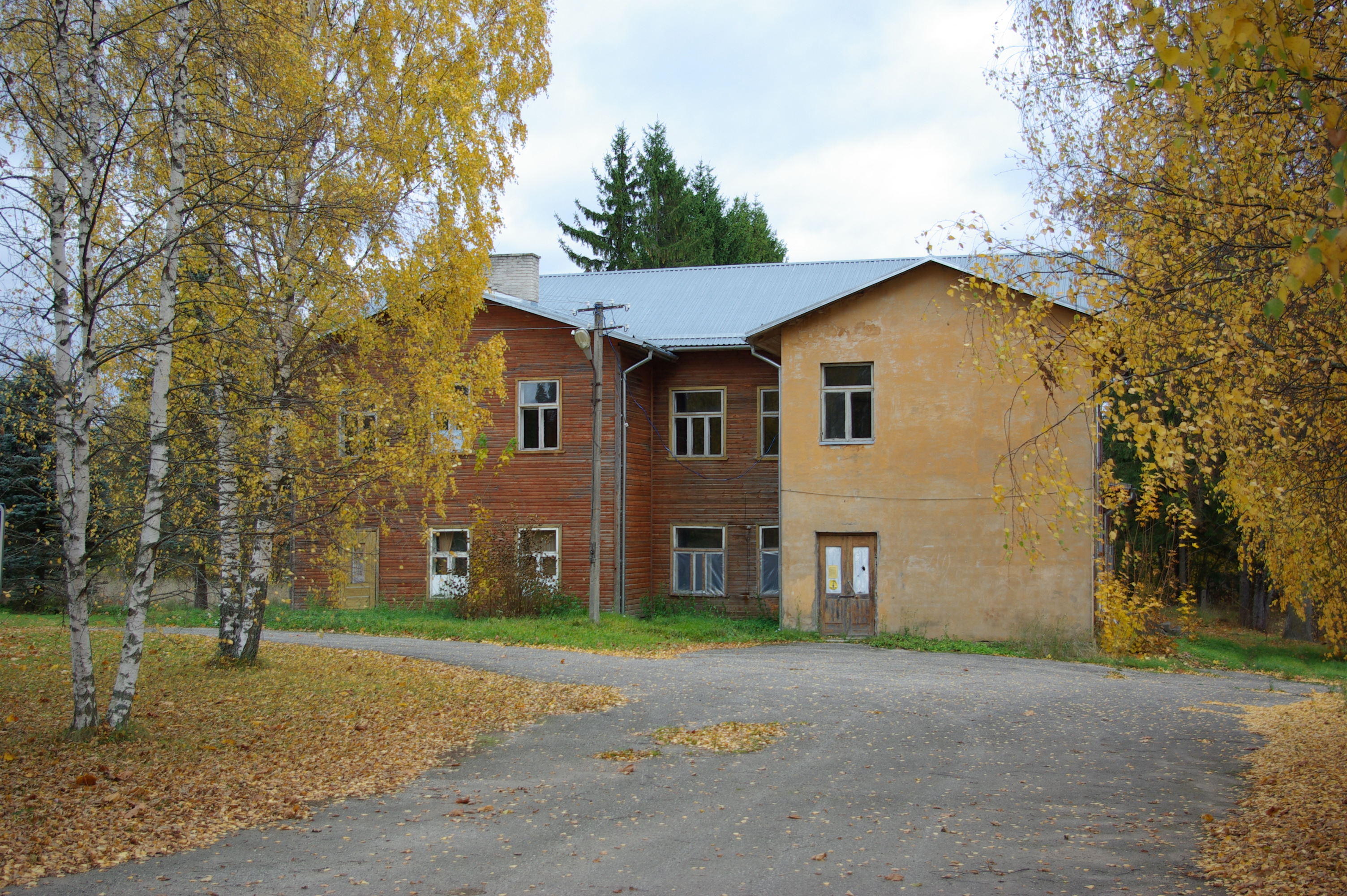 Obinitsa kool-kirik